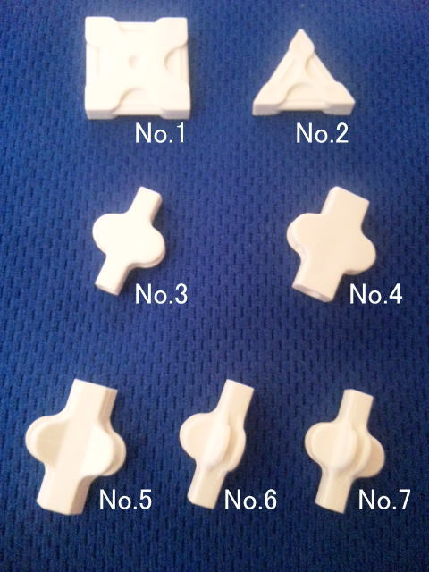 ブロック玩具LAQのブロックパーツ